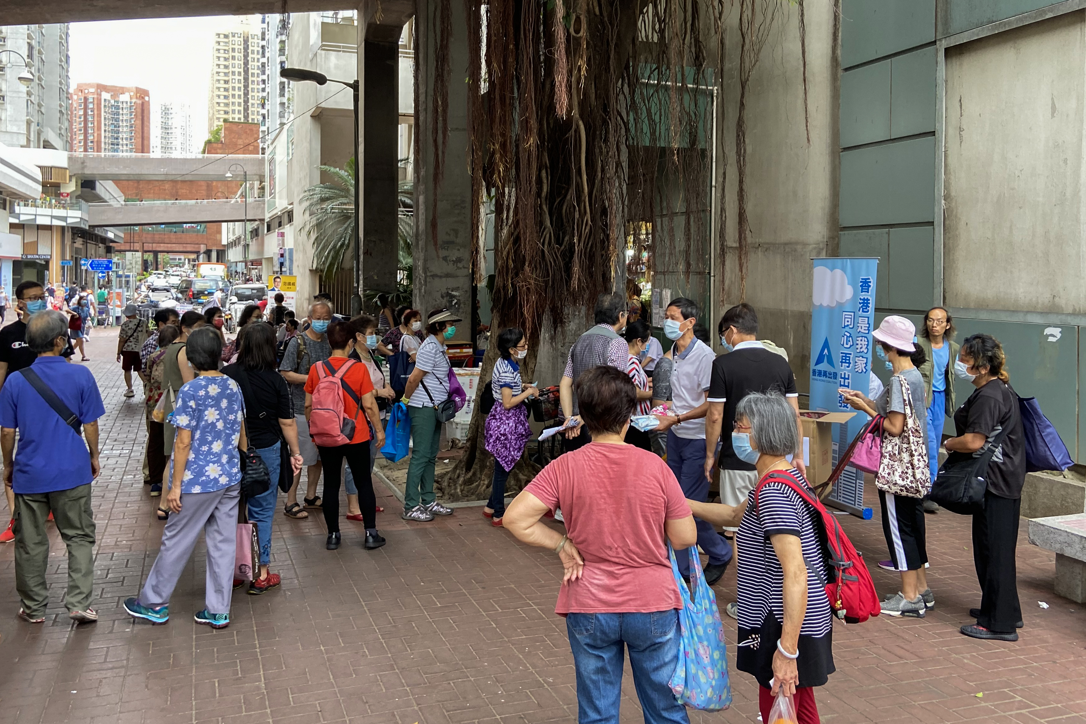 Hong Kong Coalition supply mask in Shatin